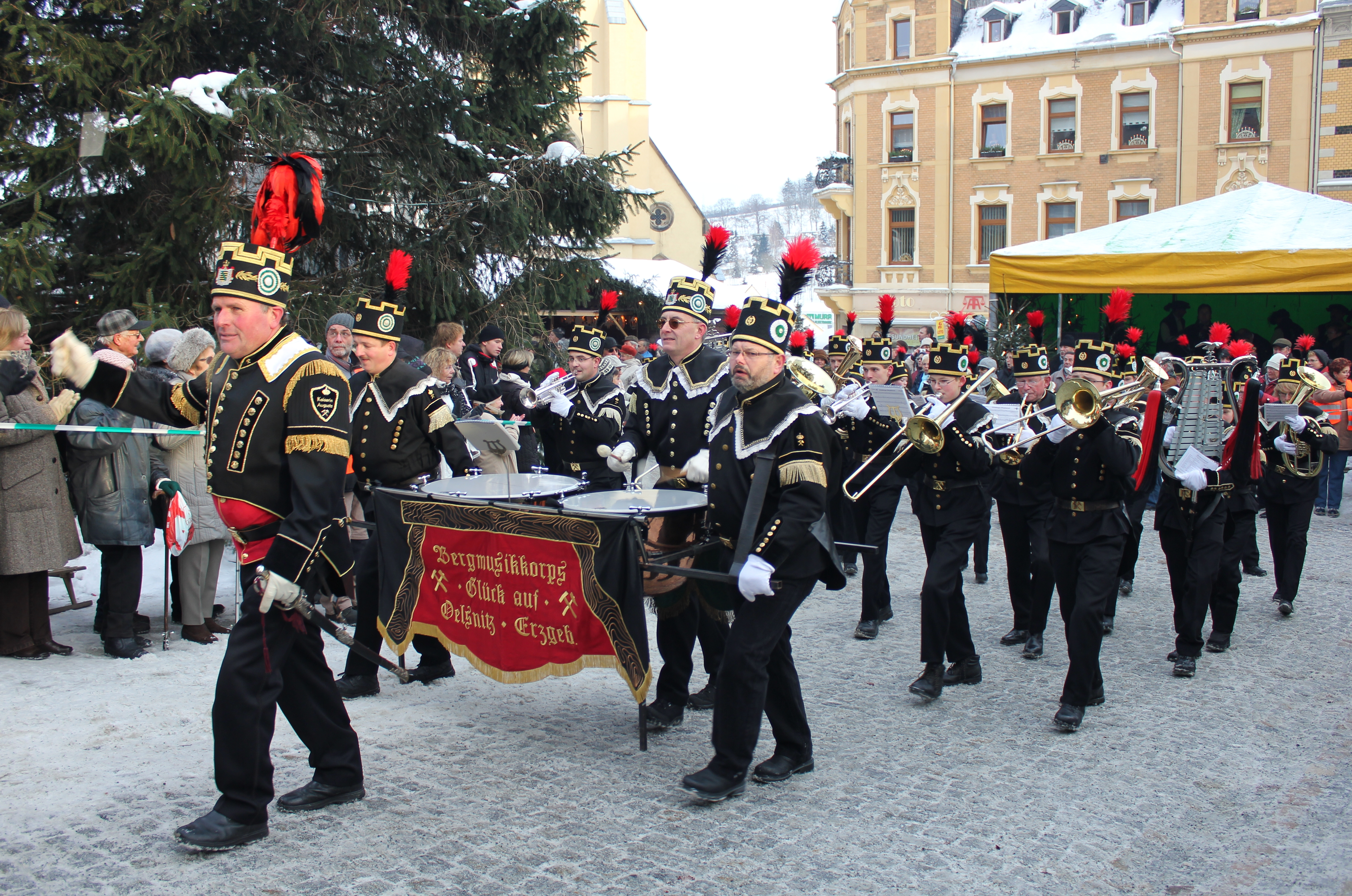 Bergparade in Stollberg. Erzgebirgskreis.